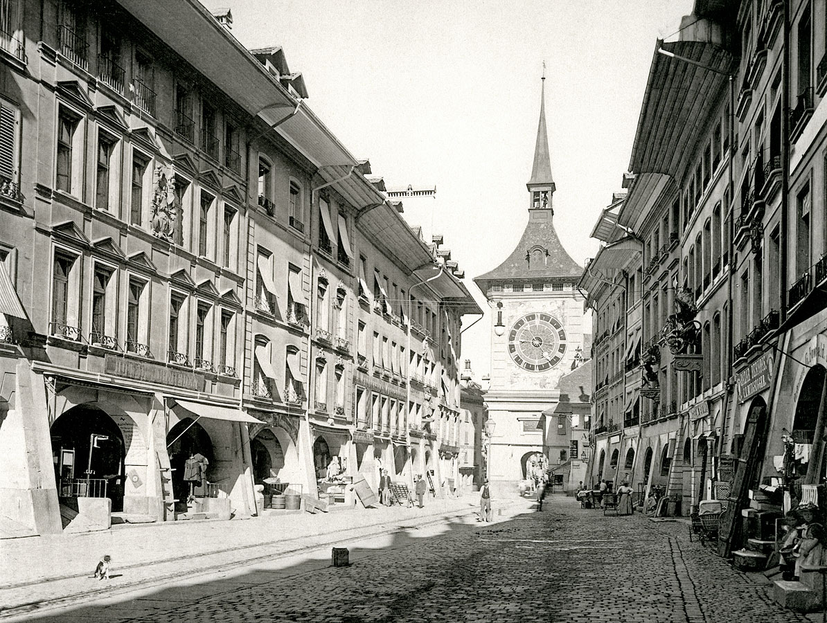 Marktgasse mit Zeitglockenturm und Zunfthäusern, Bern